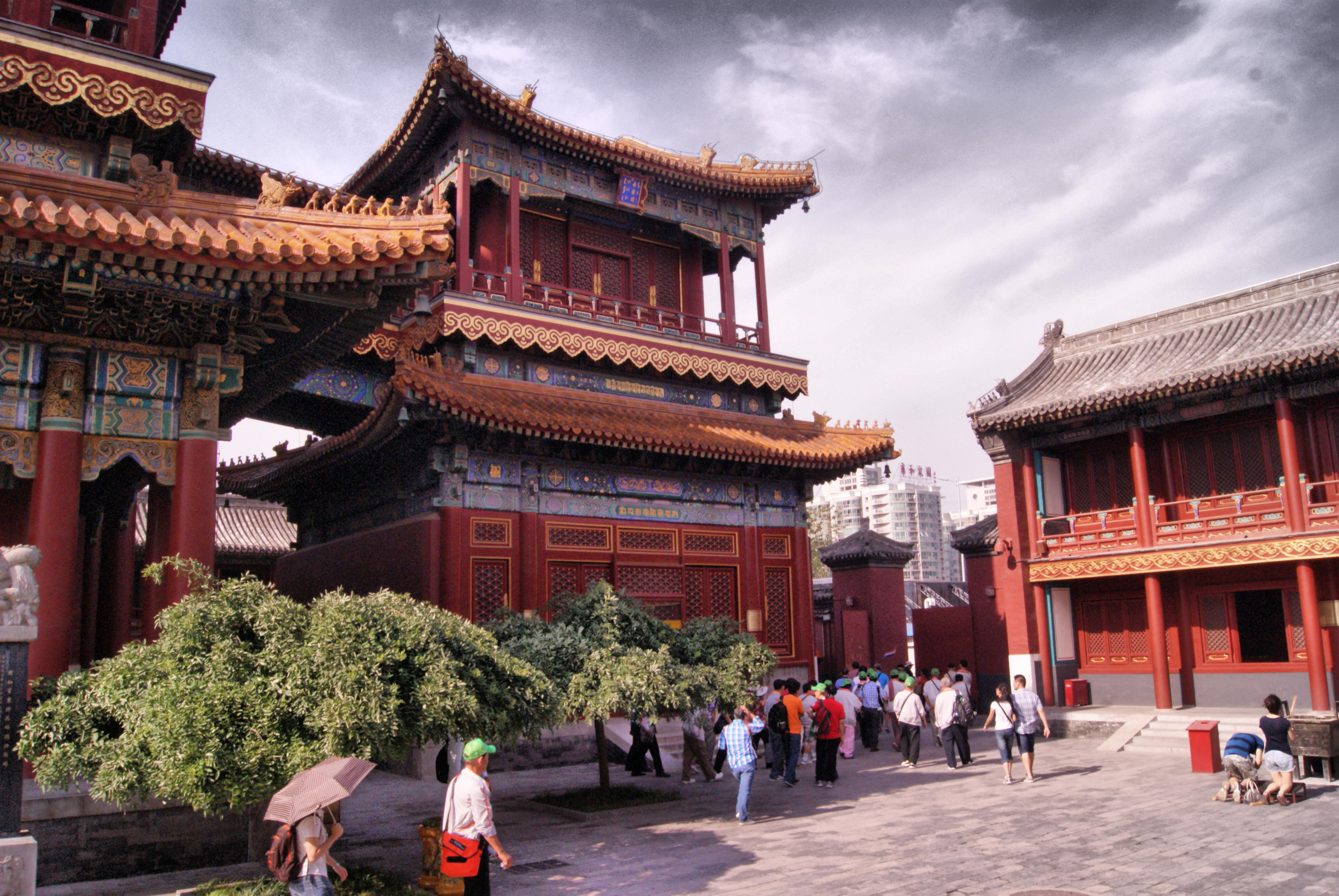 Dongcheng, Beijing, China